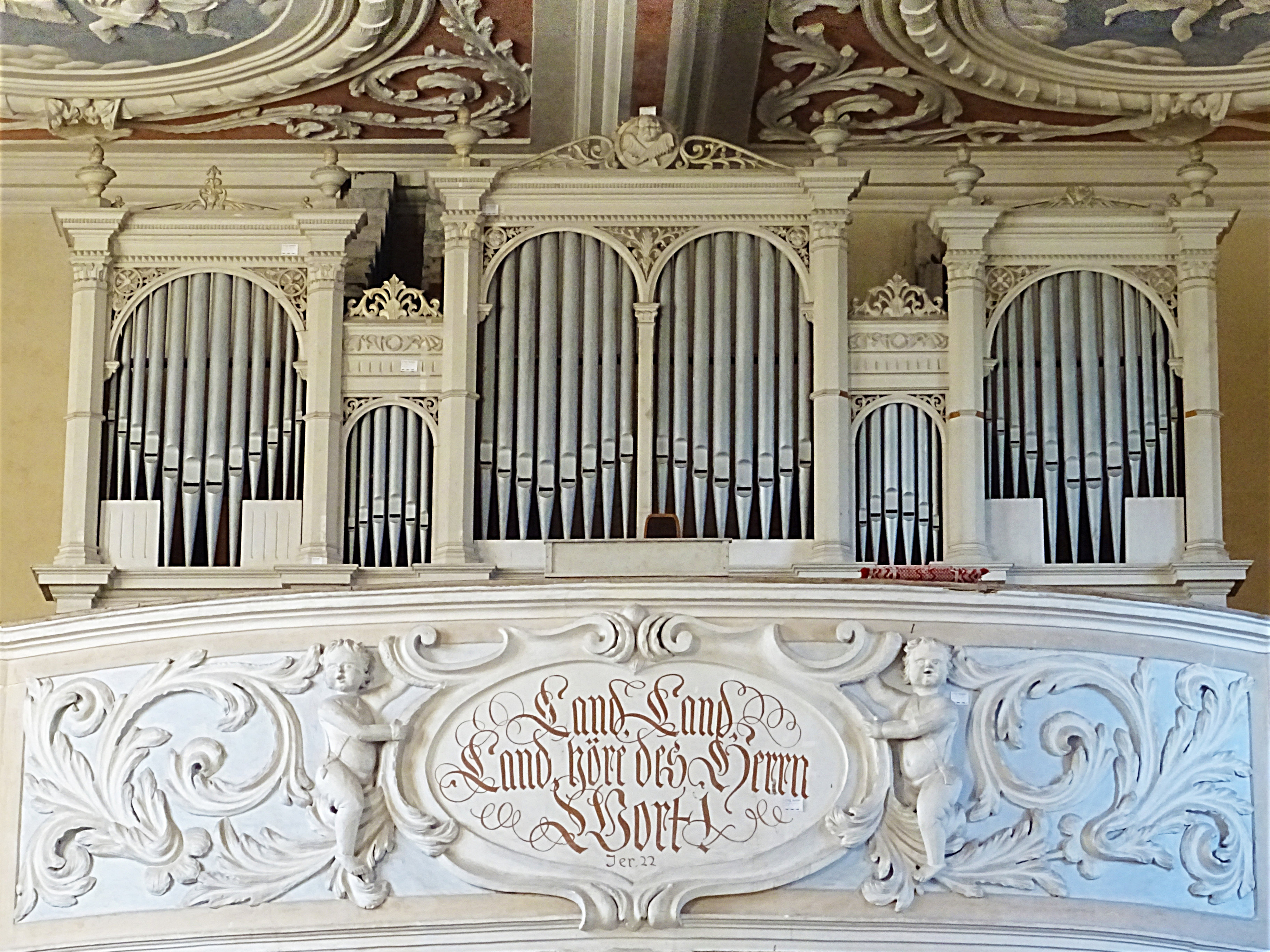 Orgel von Edmund Schulze (ca. 1860 II/P14) in der Kirche St. Simon und Juda (Neunhofen)